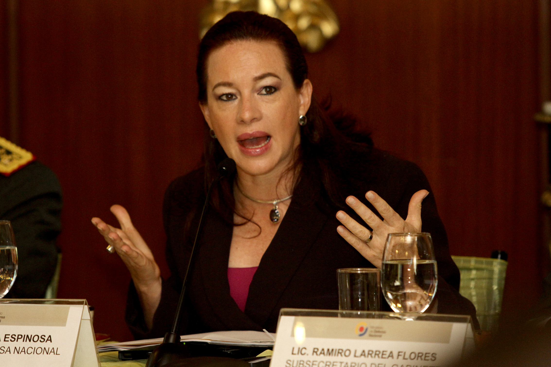 Quito, 27 de agosto de 2014 (Andes).- María Fernanda Espinoza, Ministra de Defensa, en conversatorio con medios de comunicación. Foto: Luis Astudillo C.